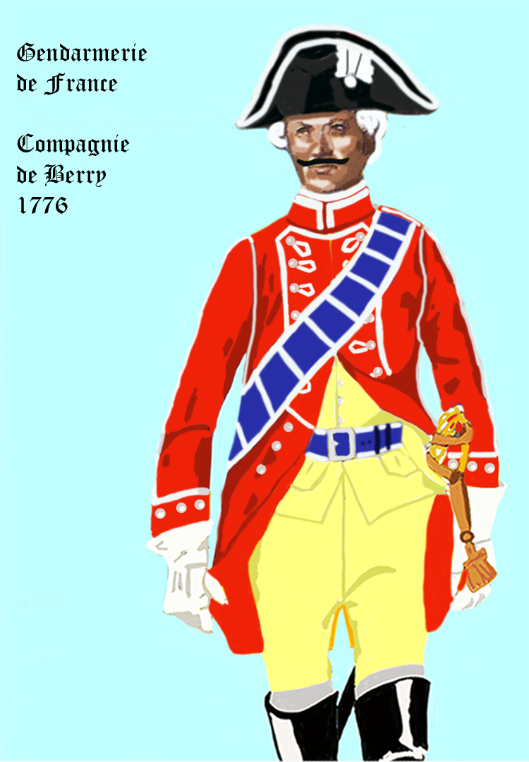 Reiter der Gendarmerie de France (Compagnie de Berry) 1776